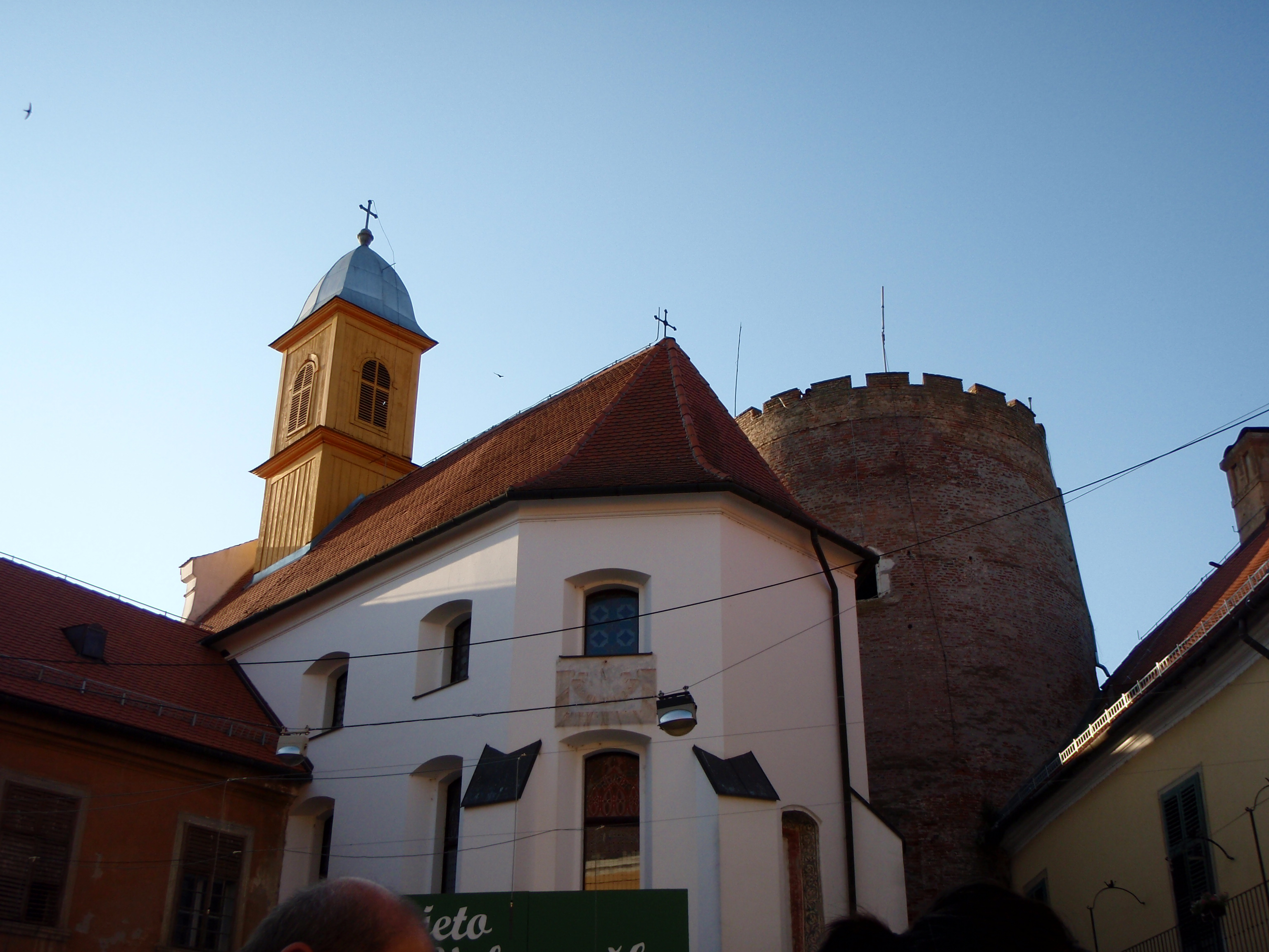 Valpovo.